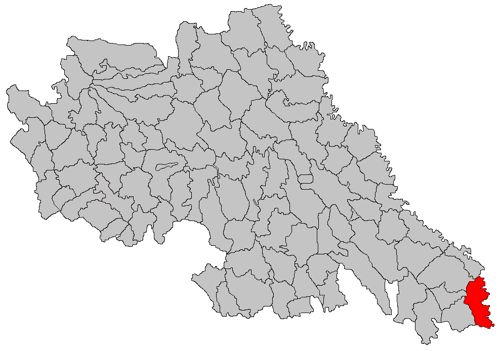 Categorie:Hărţi ale judeţului Iaşi